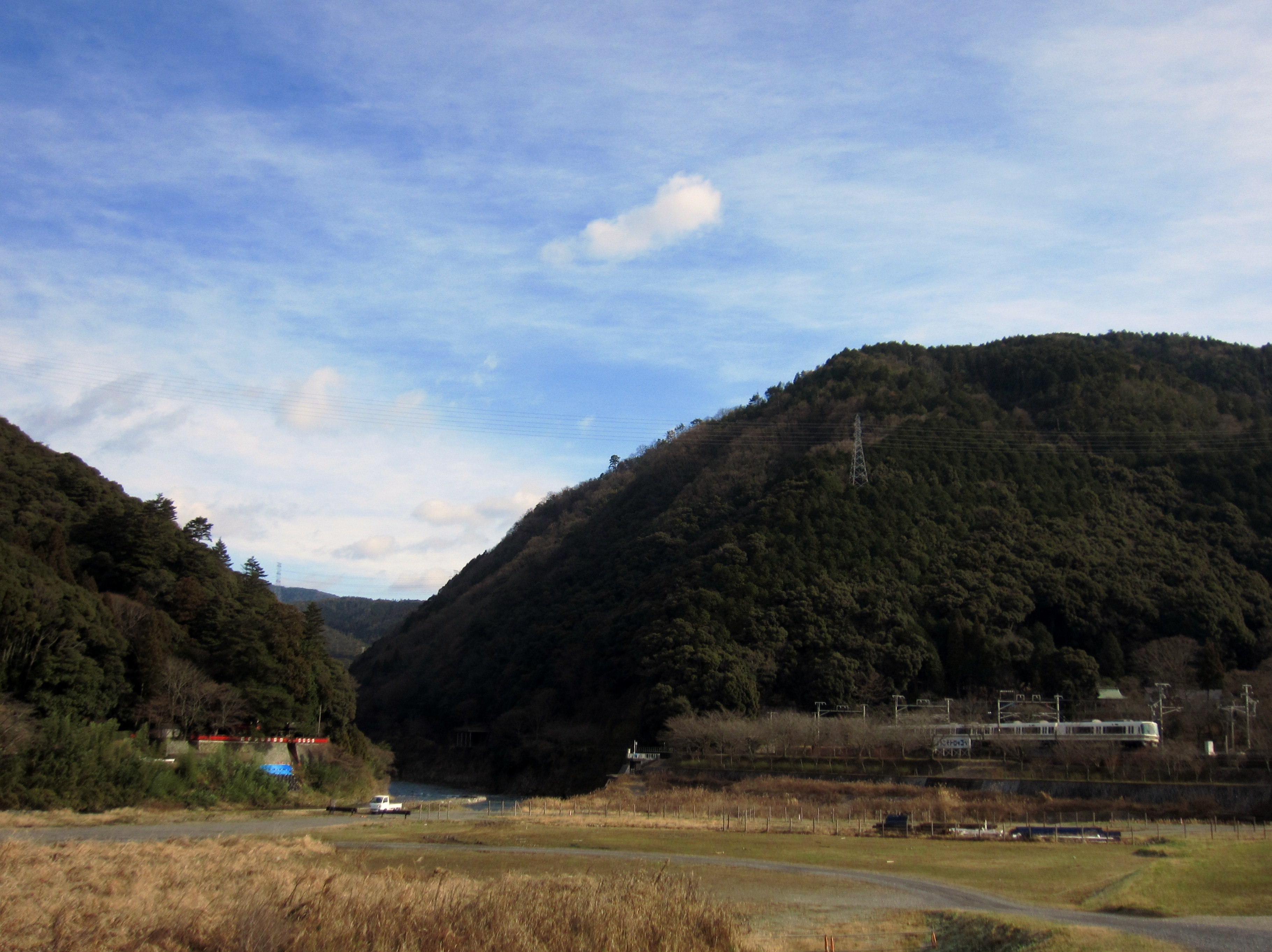 保津峡 入り口 (亀岡側)